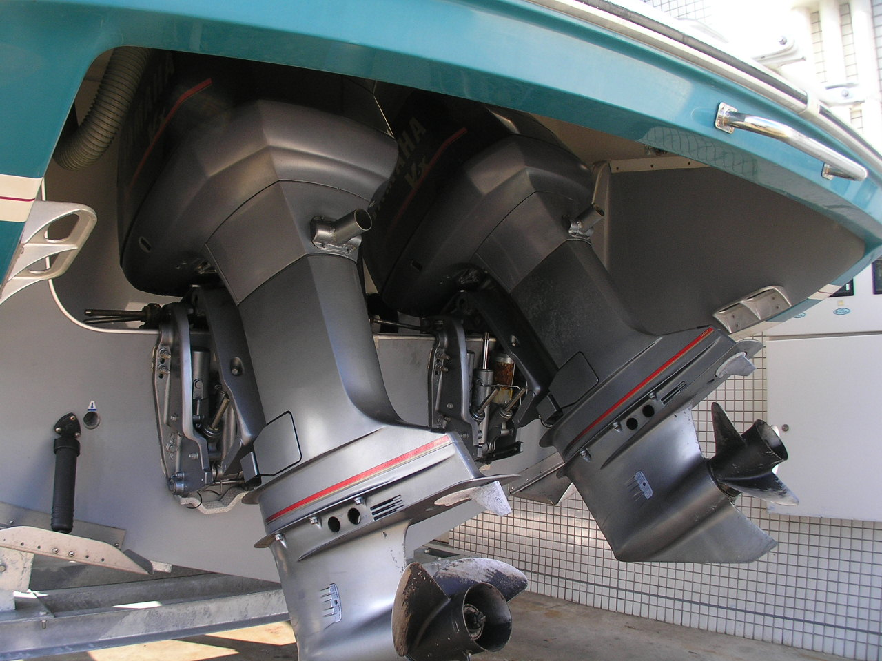 船外機～photo by Autumn Snake 【おぉたむ すねィく探検隊】写真部門 担当 大原佳苗